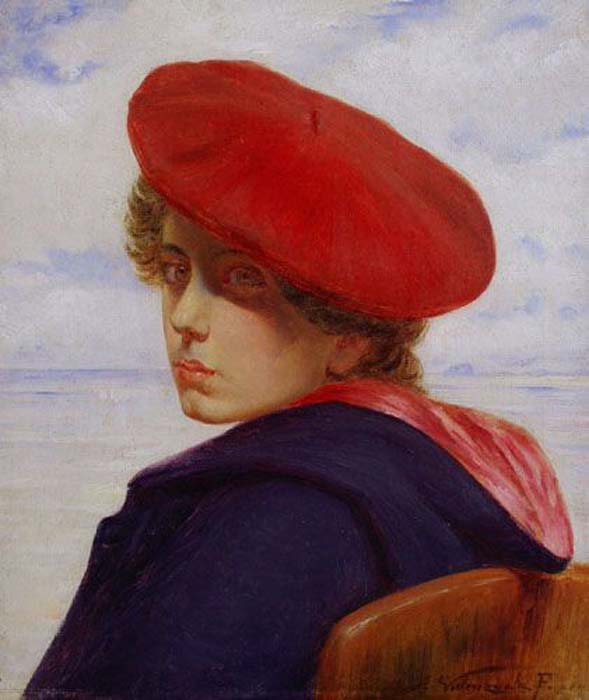 retrato masculino